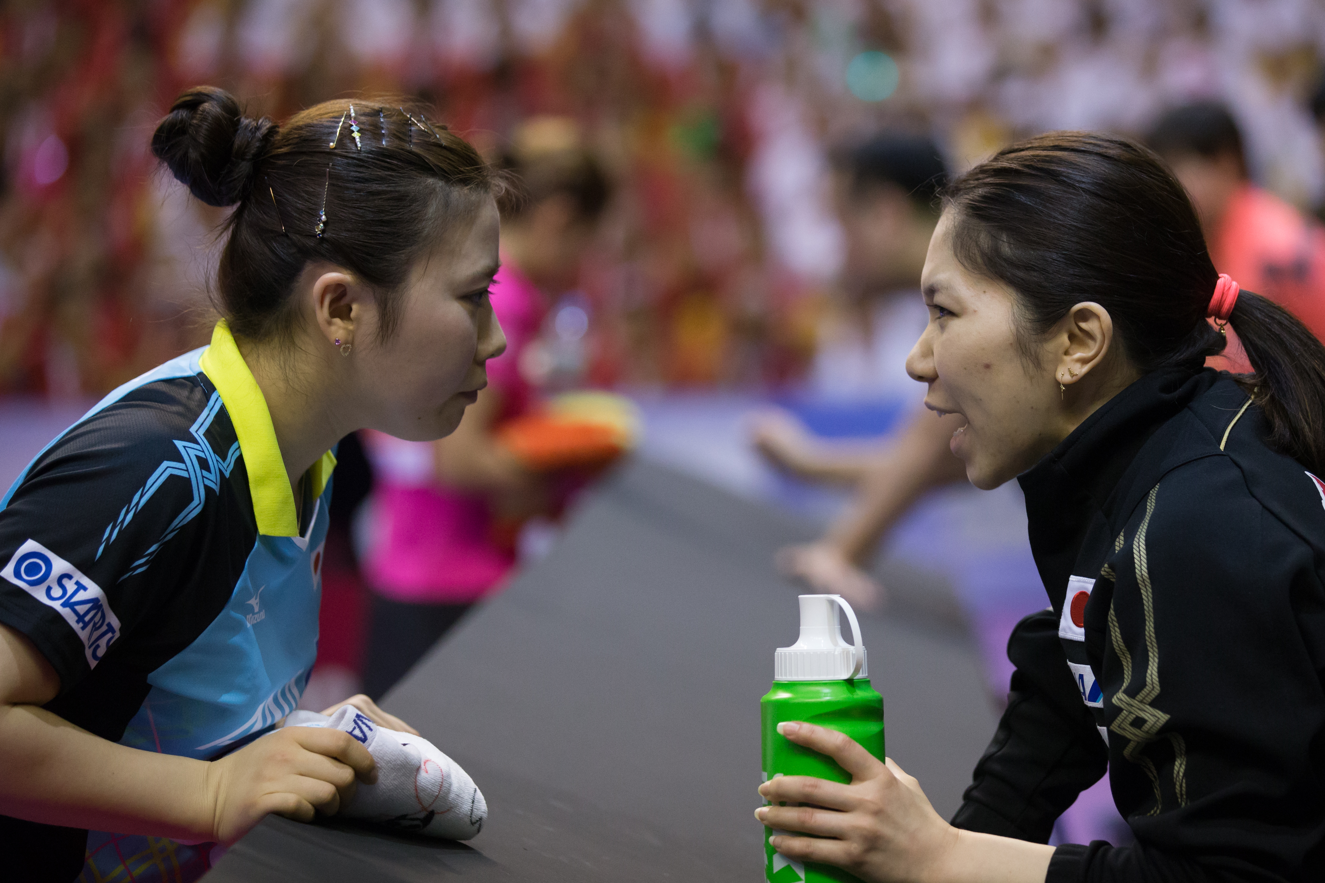 _K0K6359